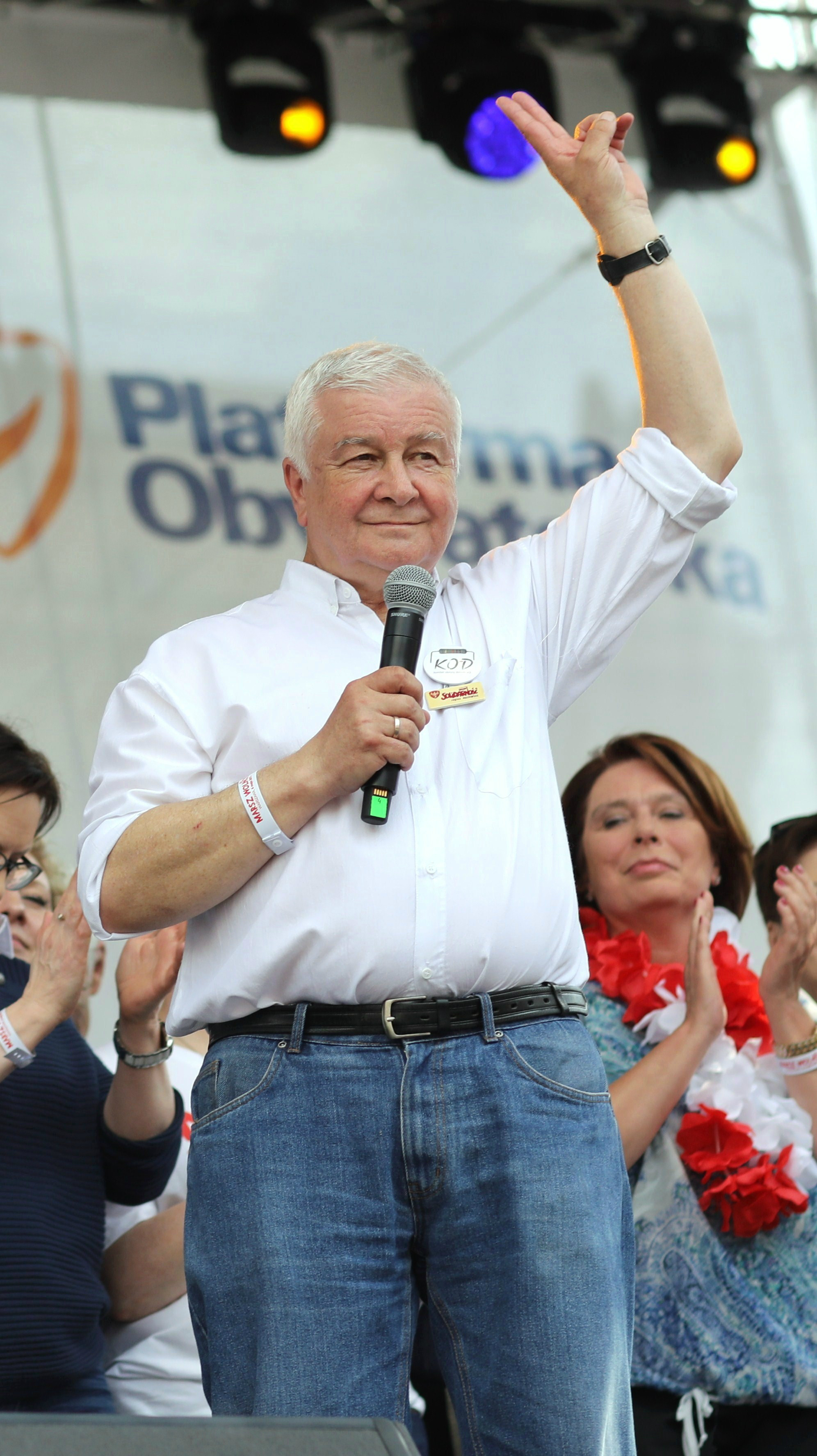 Krzysztof Łoziński, pisarz, alpinista, instruktor kung-fu, działacz polityczny.